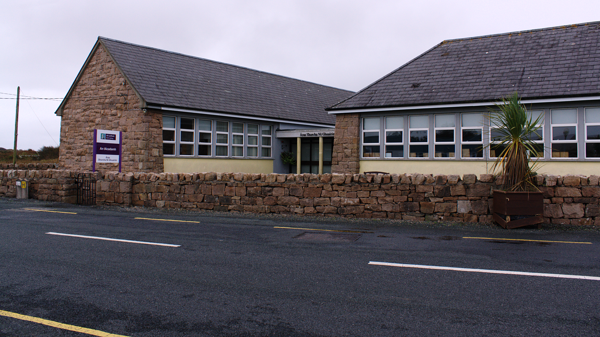 Áras Shorcha Ní Ghuairim, inead Gaelthachta de chuid Ollscoil na hÉireann Gaillimh.